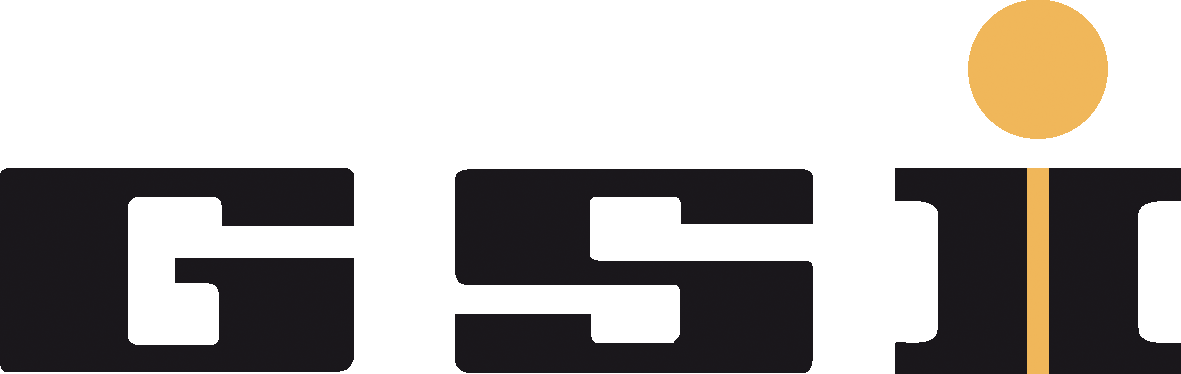 Logo der Gesellschaft für Schwerionenforschung (GSI)